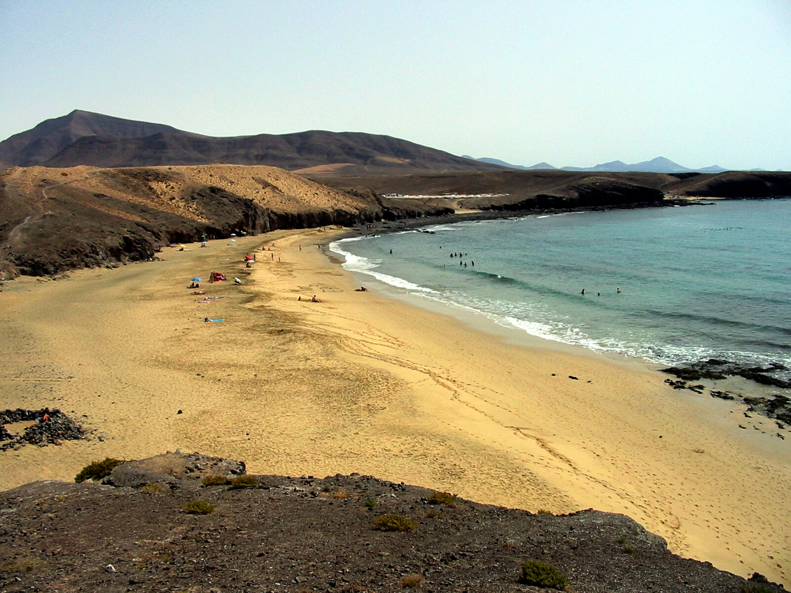 Papagayo Strand im Süden von Lanzarote